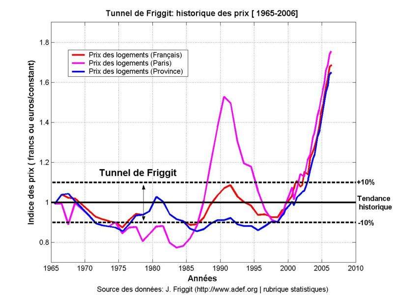 Tunnel de Friggit: Historique de l'indice à euros constant des prix immobiliers de 1965 à 2006. Les données sont disponibles à l'adresse internet suivante. La Figure a été générée à l'aide de Matlab avec un champs de données correspondant à 4*57 valeurs. Les 14 dernières valeurs de chacun des tableaux de données sont données période 2002-2006. Il est est possible d'obtenir L'intégralité du tableau de données et le programme MATLAB correspondant en contactant l'auteur. X[all]=1000*[2.0024 2.0030 2.0032 2.0038 2.0042 2.0044 2.0047 2.0048 2.0052 2.0054 2.0056 2.0059 2.0062 2.0064]; y[paris]= [1.0861 1.1548 1.1389 1.2156 1.2685 1.3161 1.3452 1.3875 1.4377 1.4853 1.5356 1.5805 1.6175 1.6784 1.6863] y[province]=[1.0543 1.0596 1.1151 1.1522 1.2183 1.2394 1.3320 1.3611 1.4007 1.4589 1.5091 1.5541 1.5858 1.6175 1.6387]; y[france]= [1.1337 1.1284 1.2103 1.2341 1.3267 1.3452 1.3954 1.4298 1.4615 1.5065 1.5620 1.5990 1.6572 1.6863 1.7418]